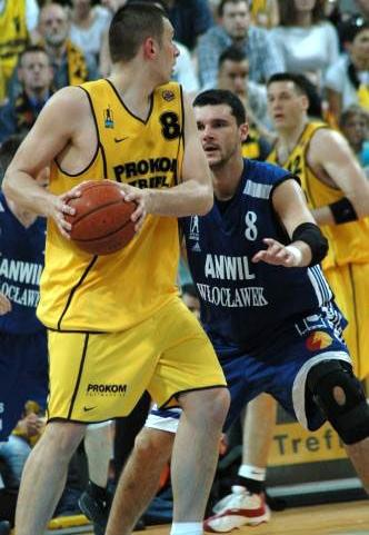 dylewicz(prokom) witka (anwil) podczas meczu sam robilem foto